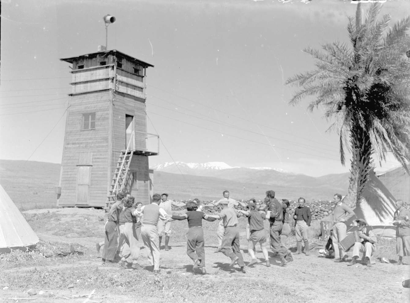 אוסף צילומים של הצלם זולטן קלוגר טווח מספרי התשלילים 12904 - 12954: חיאם אל-ואליד (חומה ומגדל - קיבוץ עמיר)